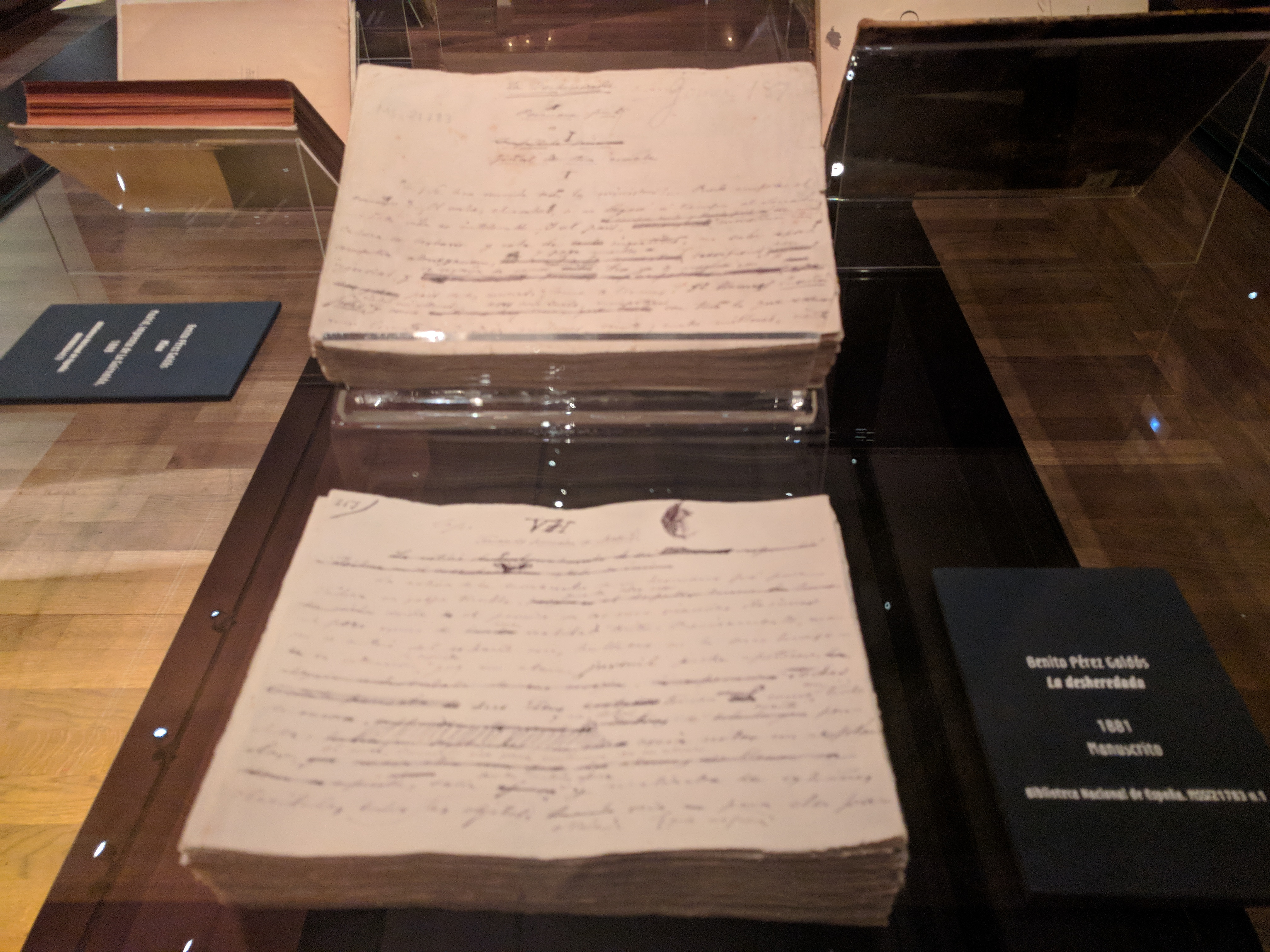 Manuscrito de La desheredada de Benito Pérez Galdós, 1881. Biblioteca Nacional de España.